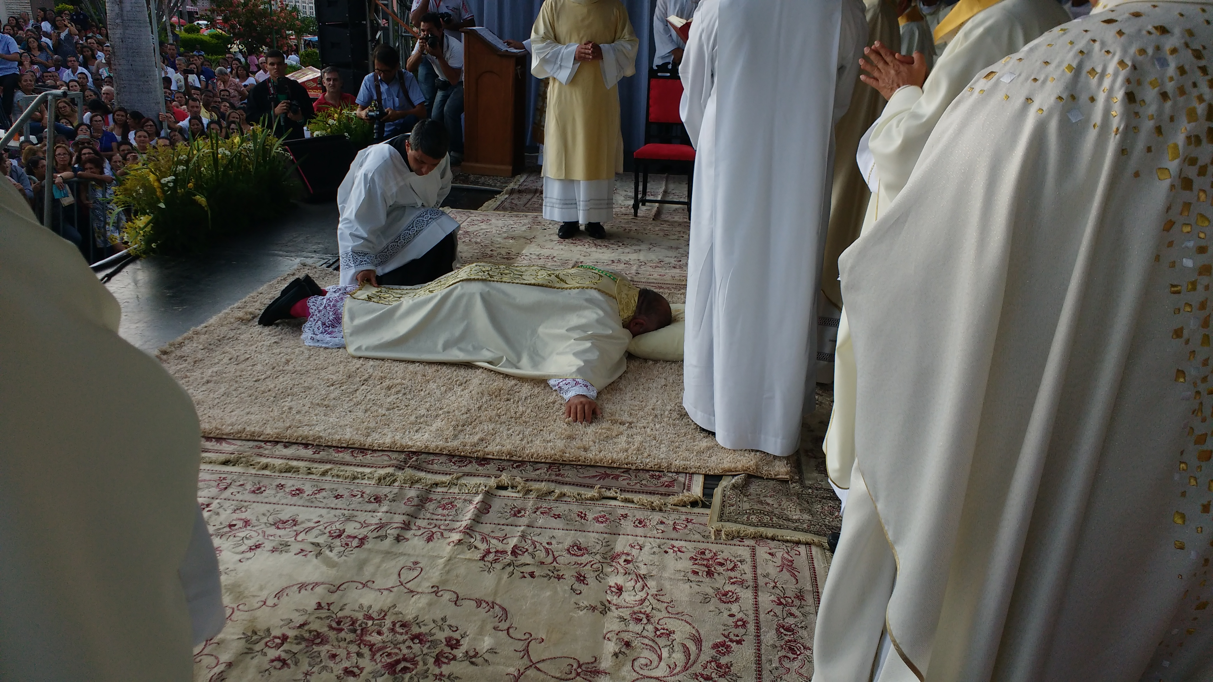 Momento da posse do nono bispo diocesano de Caetité, Bahia, Brasil, Dom Carvalho.